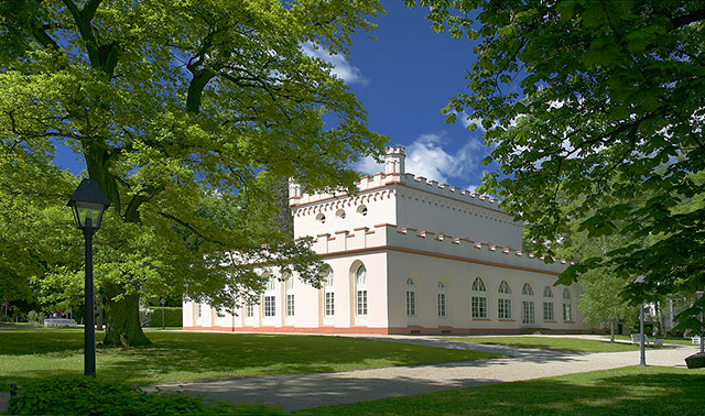 La maison gothique de Bad Homburg (Allemagne)